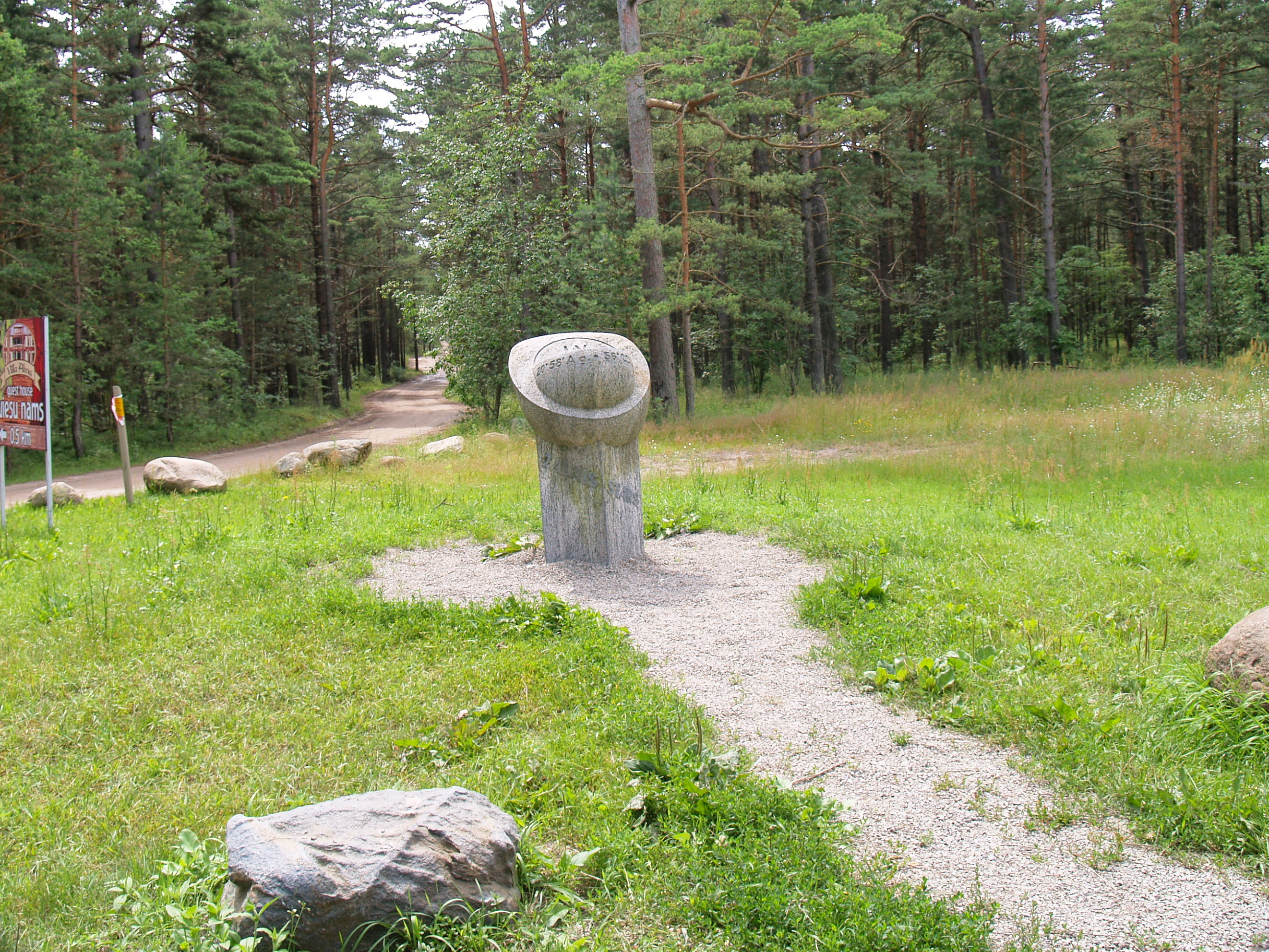 "Zaļais stars" - Latvijas galējais rietumu punkts (Green Ray - farthest west point of Latvia)